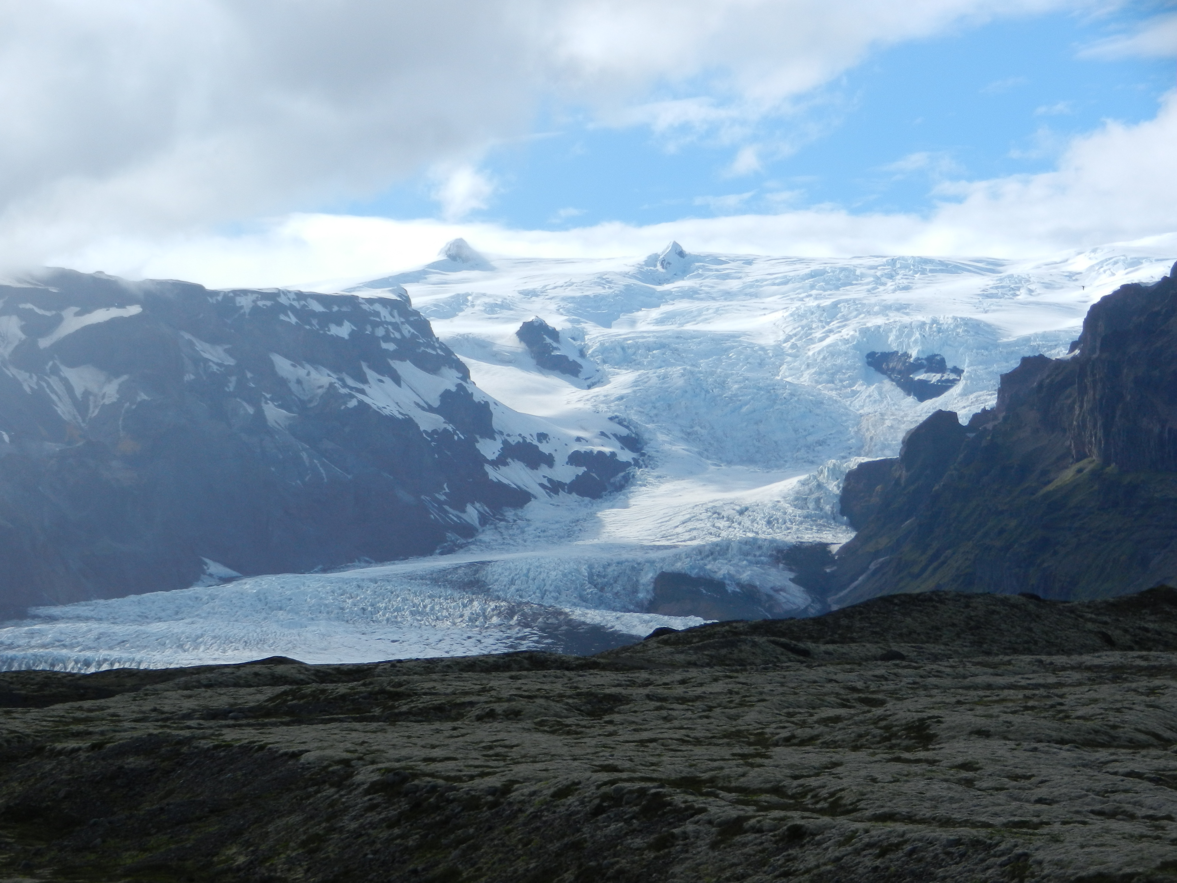 Ledenik Breiðamerkurjökull se spušča iz ledenga pokrova Vatnajökull, Islandija.